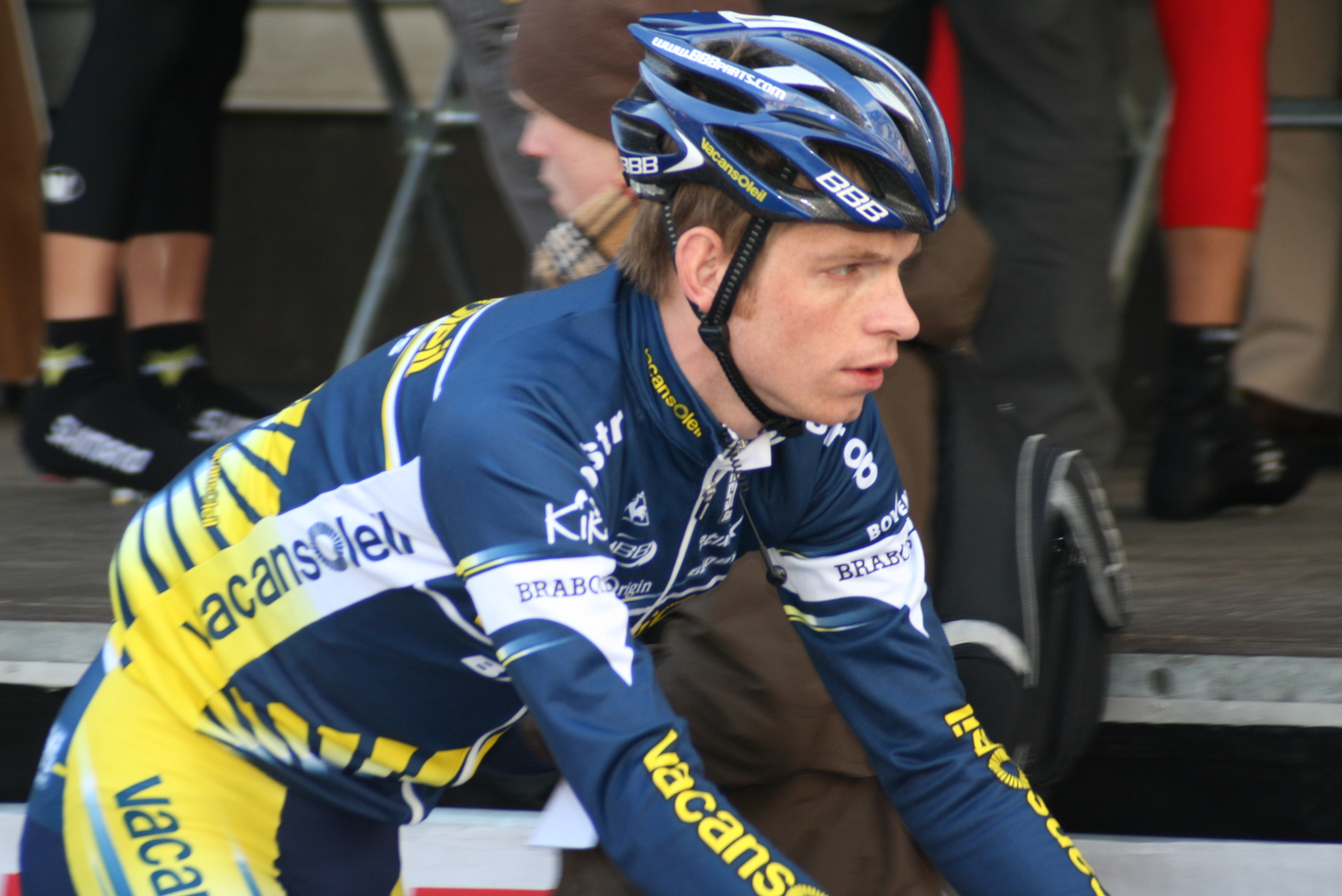 Joost Van Leijen lors des Trois jours de Flandre occidentale 2010